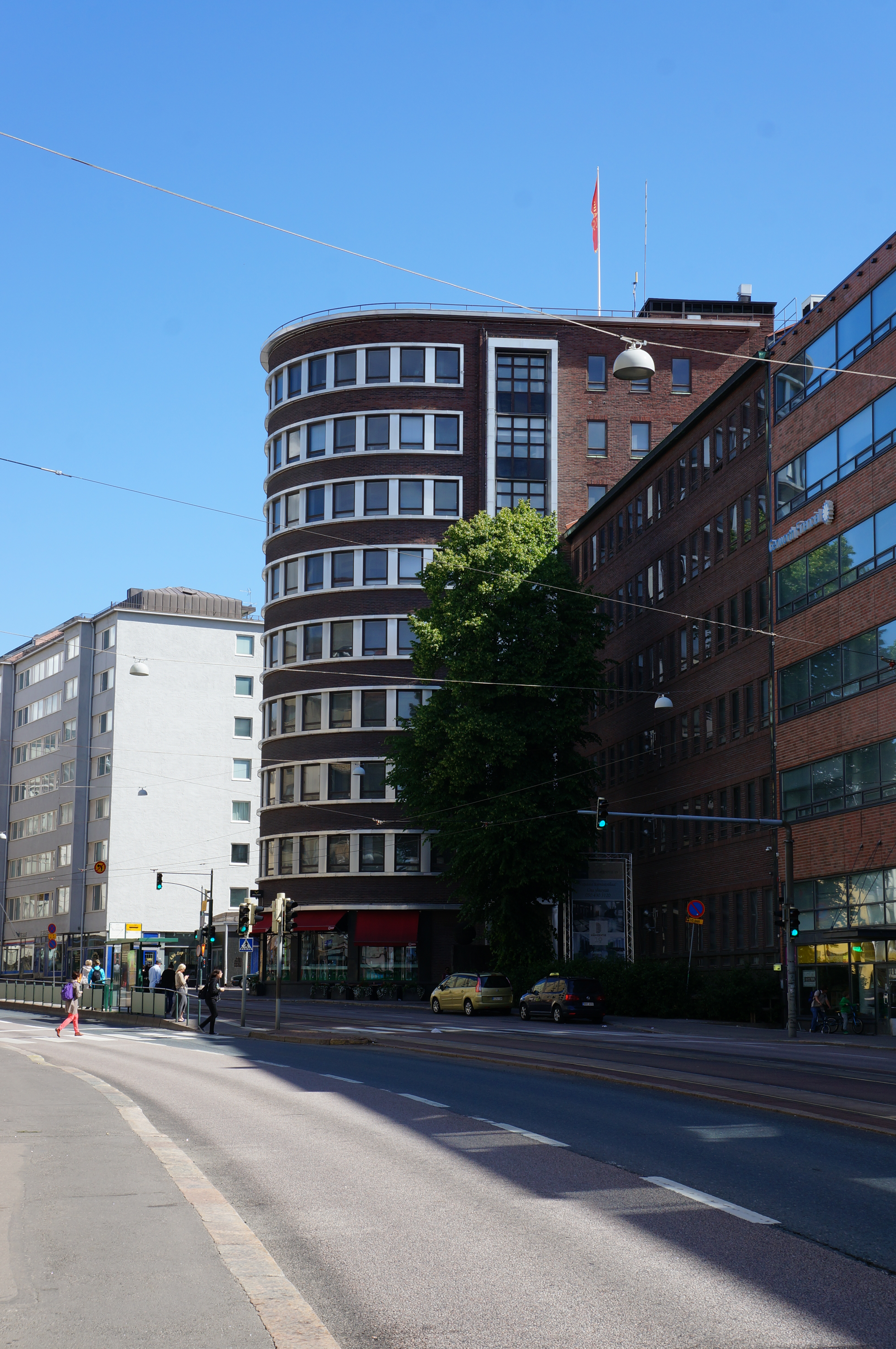 Osuustukkukaupan hallitorakennus Hämeentiellä Helsingissä 28.6.2014